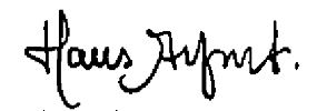 Arkitekt Hans Alfonts signatur på en ritning